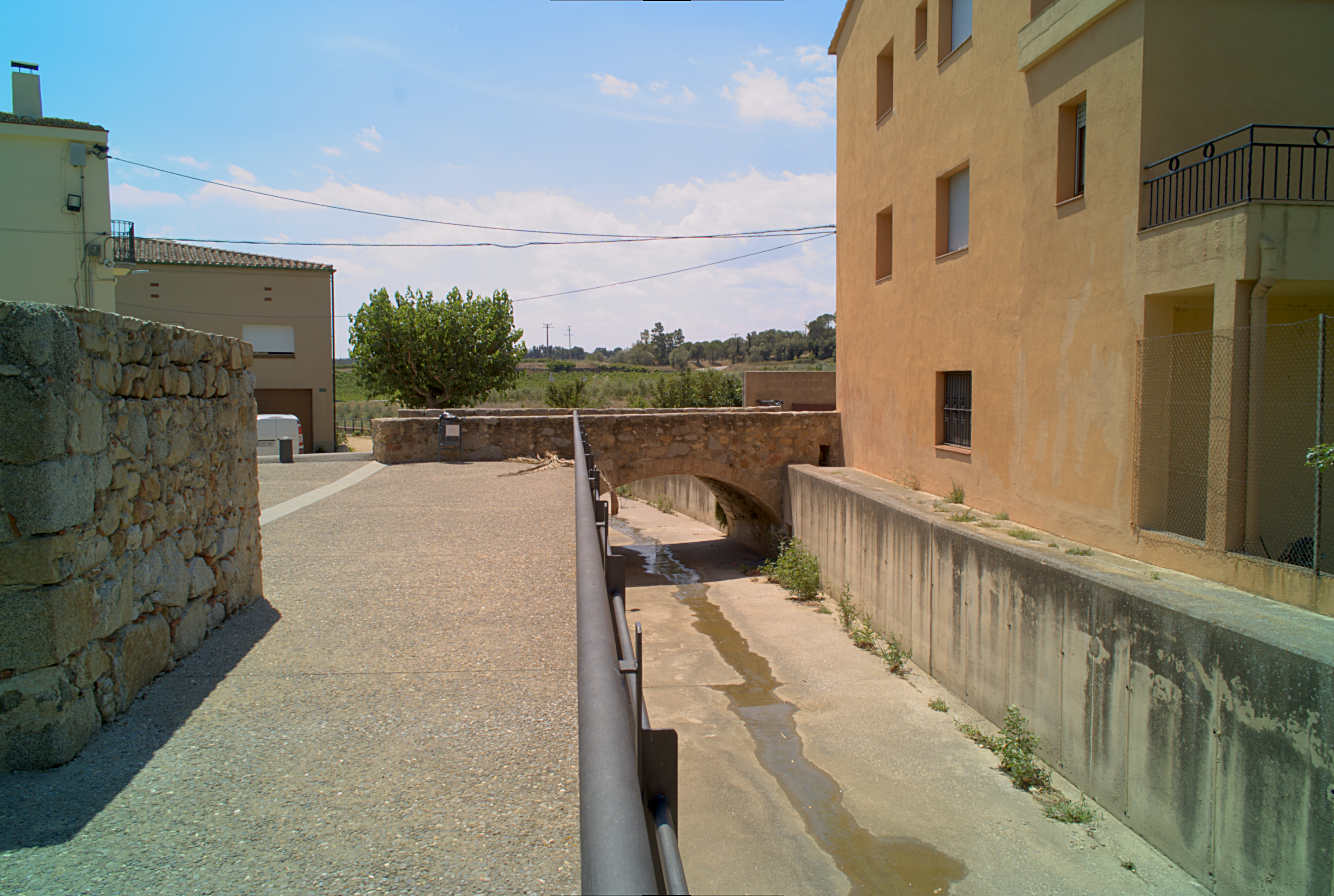 Le Pont, rue du Pont, Capmany (Haut-Ampurdan, Catalogne, Espagne)